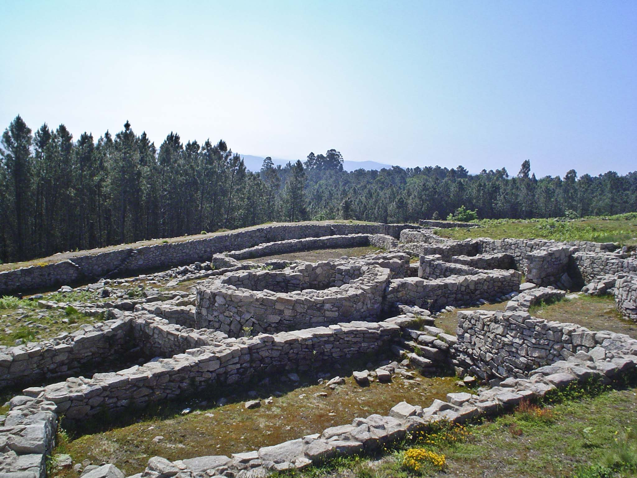 Estruturas dunha casa patio coa construción ovalada no centro, na zona leste da antecroa do Castro de San Cibrao de Las